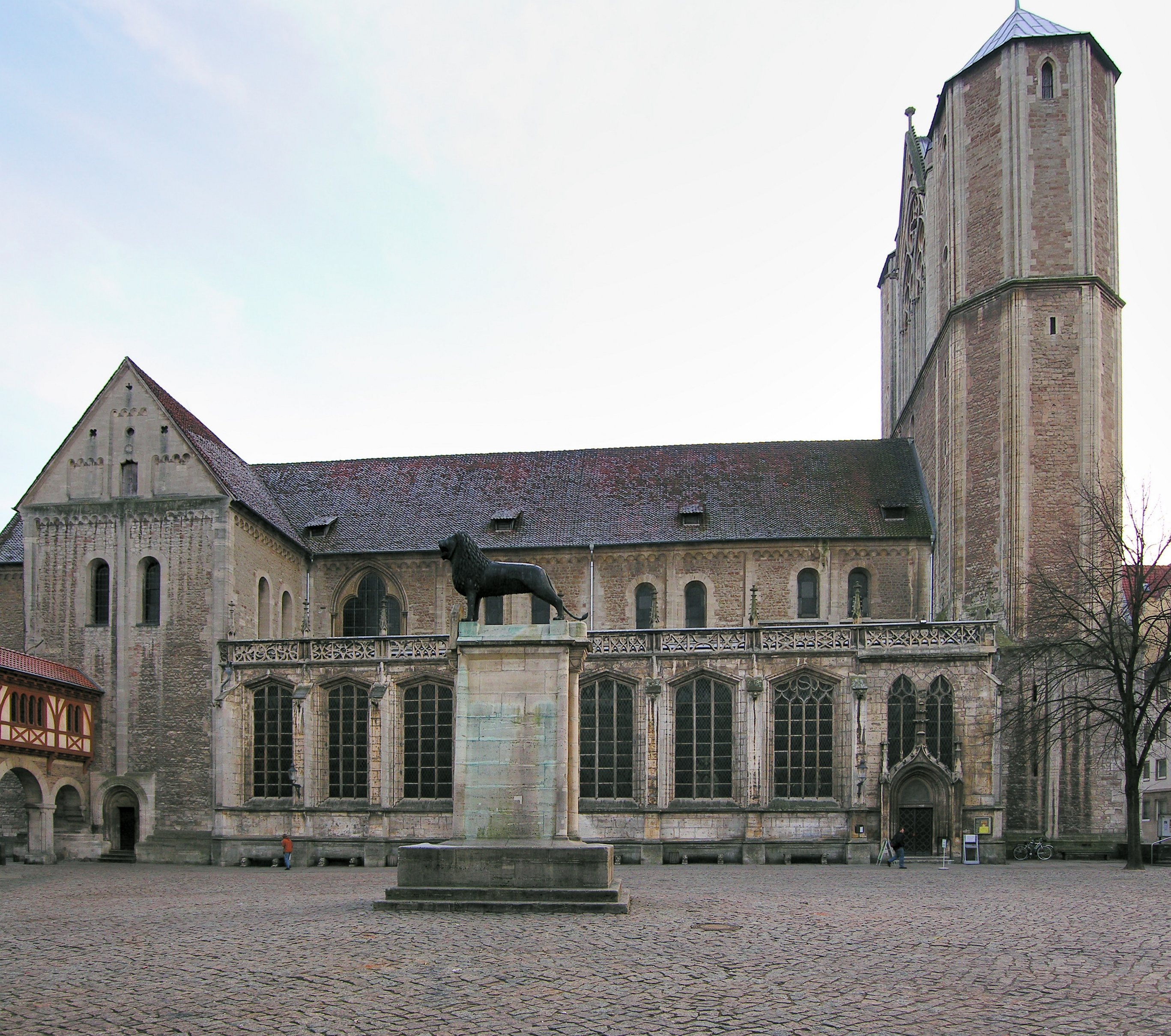 Gesamtansicht des Braunschweiger Doms vom Burgplatz. Im Vordergrund der Braunschweiger Löwe. Aufgenommen am 17.01.2006. Verzeichnungen entfernt mit ShiftN.